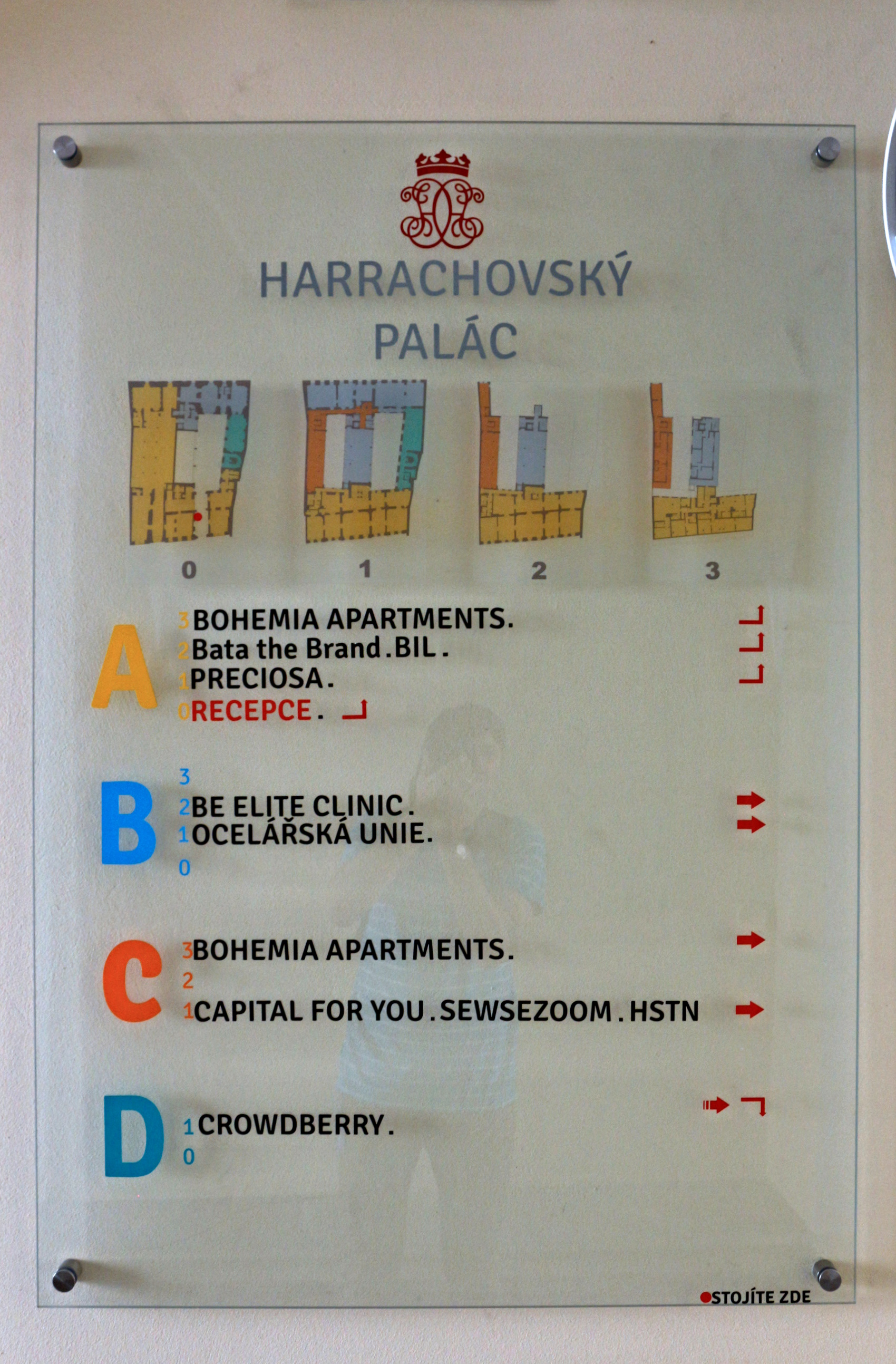 Harrachovský palác v Praze